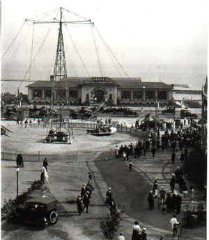 Dean's Boats/Palais Royale, 1923